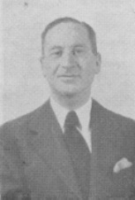 politico italiano